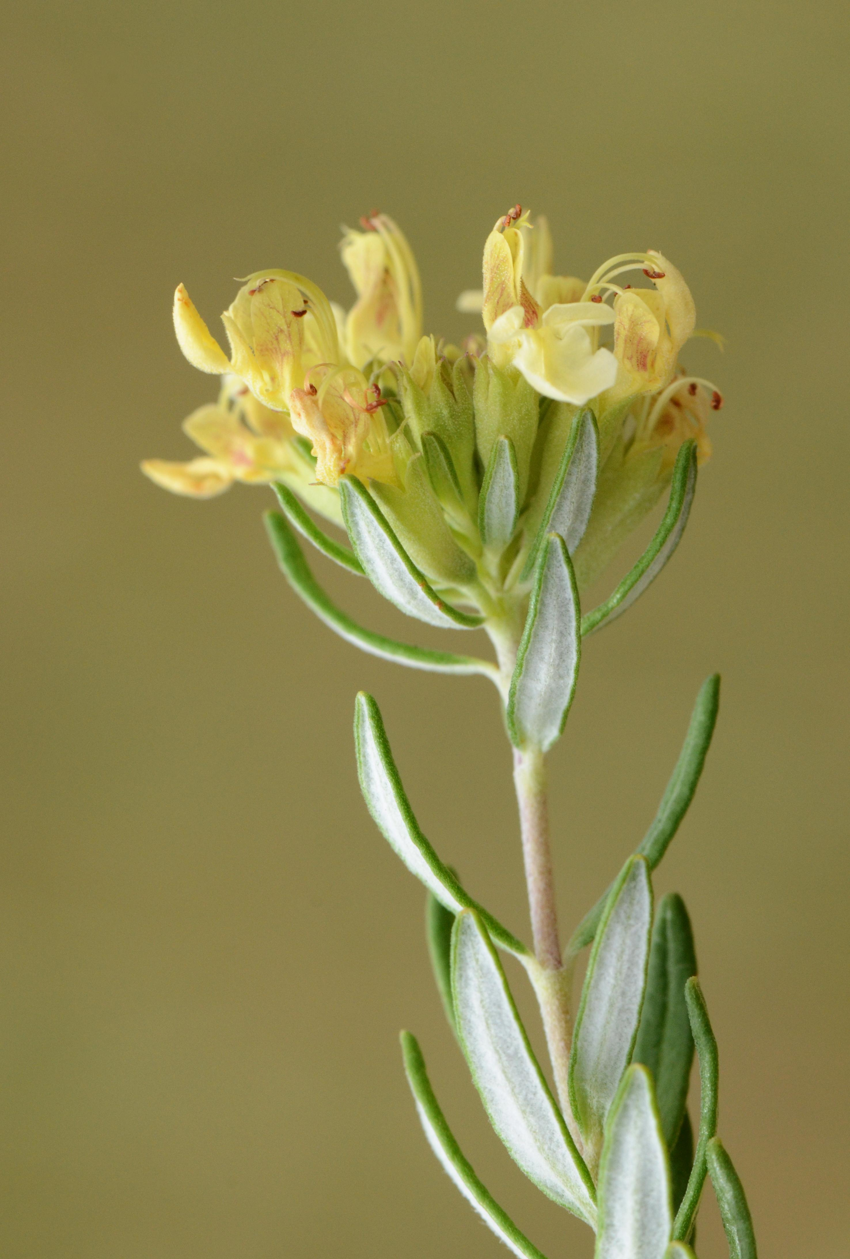 Teucrium montanum L., germandrée des montagnes, feuilles linéaires, quasi-sessiles, au revers tomenteux; chaume de Soubérac, “Pelouses à thérophytes mésothermes thermo-atlantiques” Charente, France